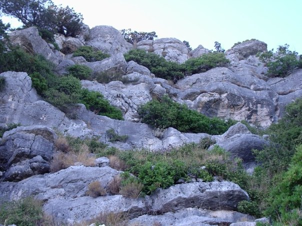 Nepristupačne stijene s južne strane ilirske gradine na Mljetu, Hrvatska